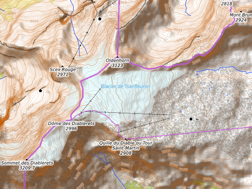 carte réalisée sur umap This map may be incomplete, and may contain errors. Don't rely solely on it for navigation.